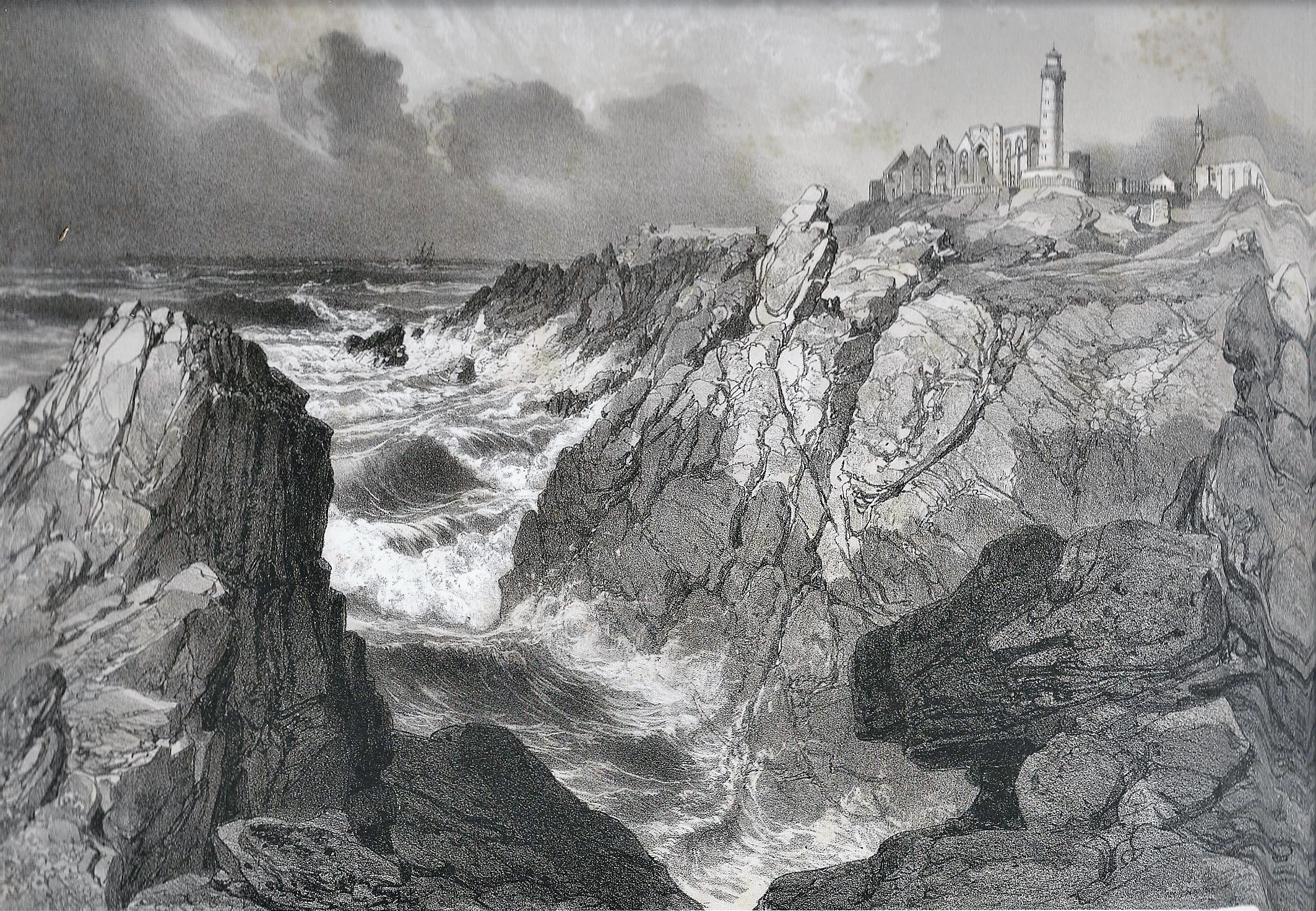 Cap, abbaye et phare Saint-Mathieu (Félix Benoist, "La Bretagne contemporaine", tome "Finistère", 1867).